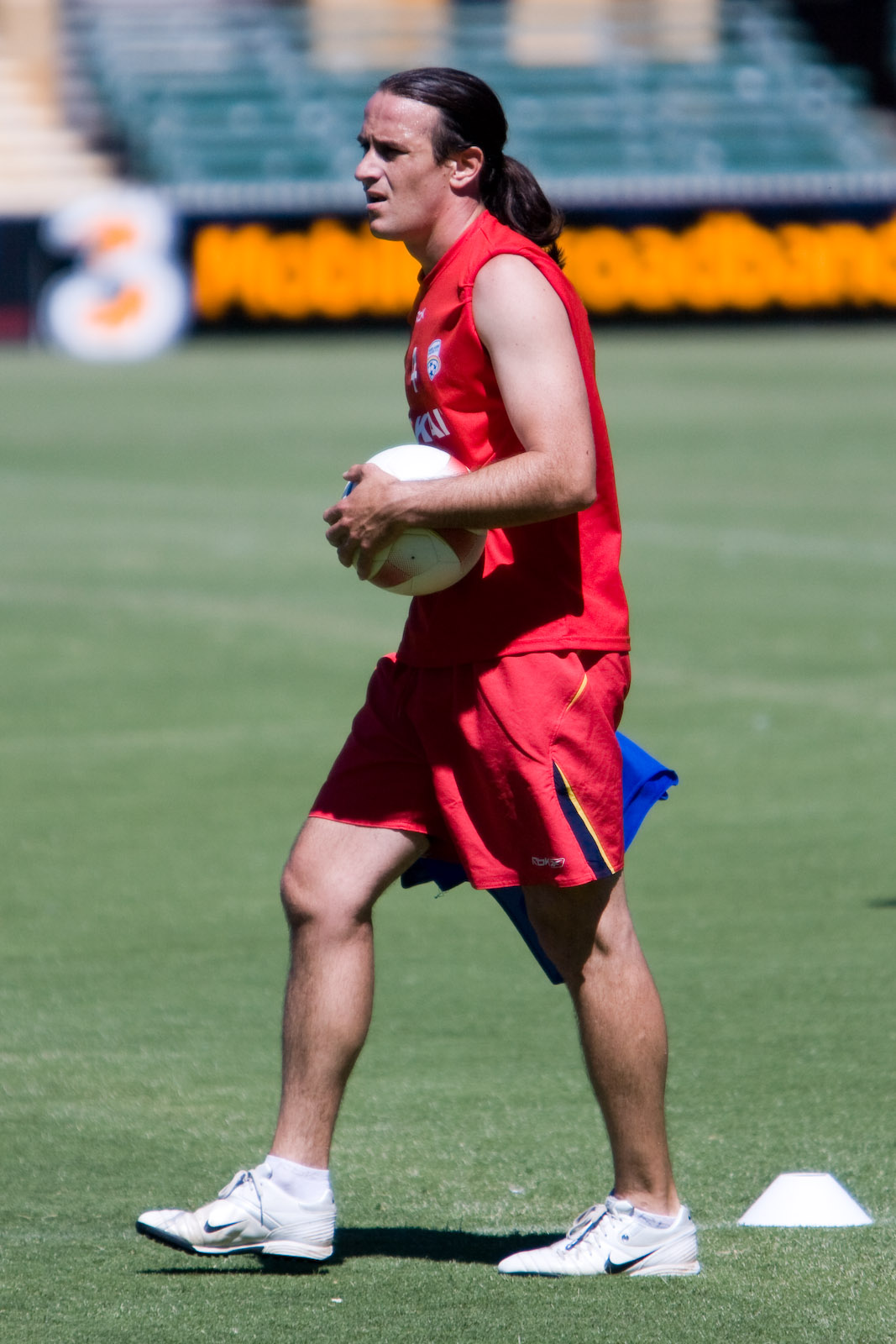 Angelo Costanzo